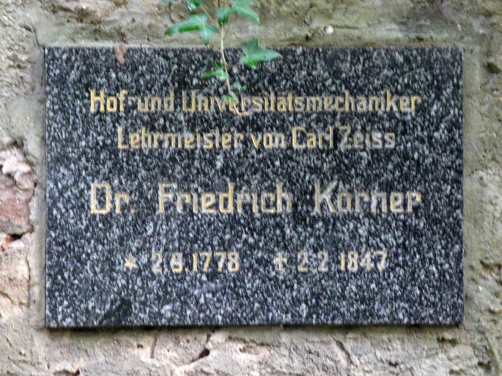 Grab von Friedrich Körner auf dem Johannisfriedhof in Jena